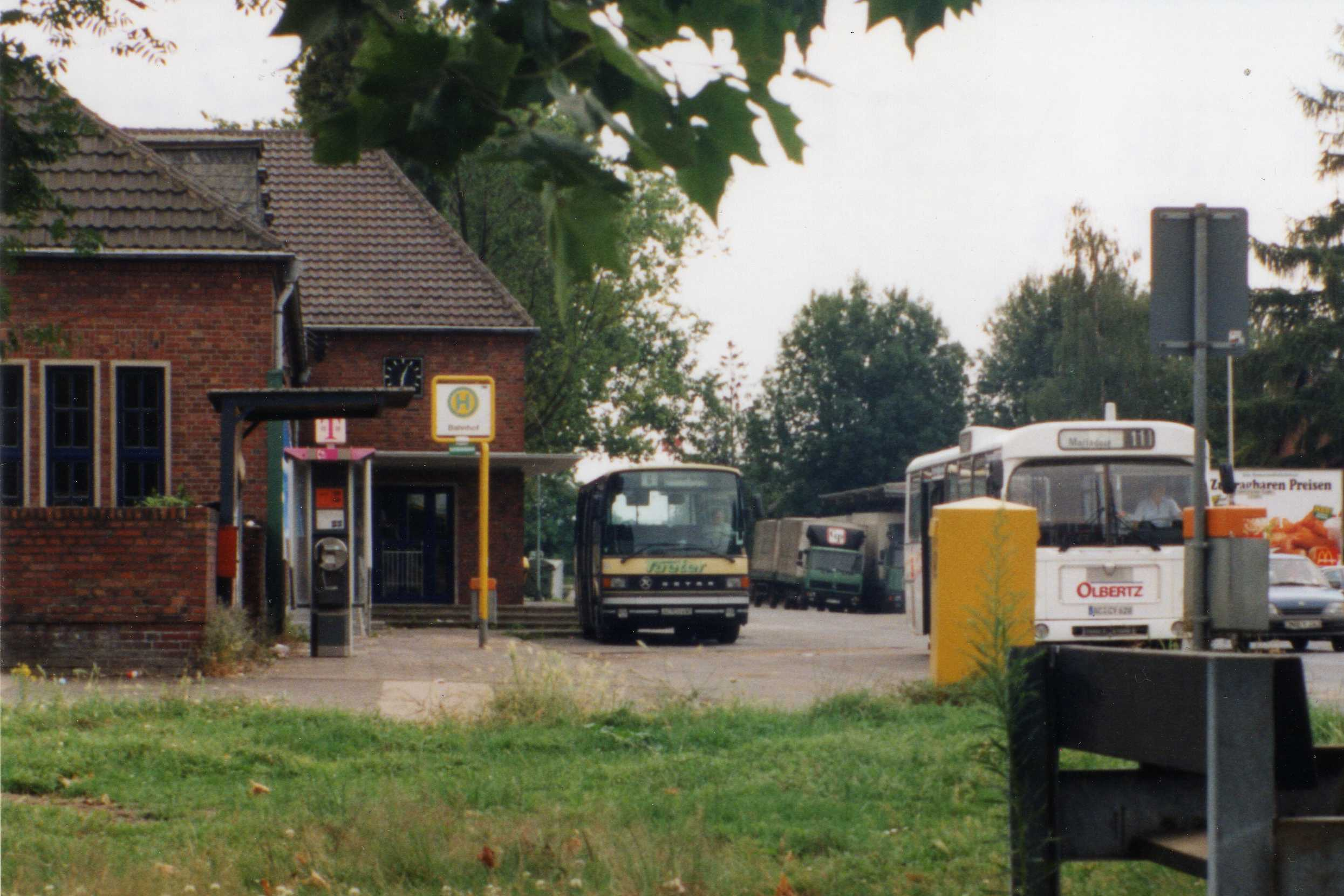 1997 war der neue Zentrale Omnibus-Bahnhof (ZOB) am Jülicher Bahnhof noch nicht fertig. Stattdessen warten für die ASEAG-Linie A 6 nach Eschweiler ein Bus der Fa. Taeter und für die BVR-Linie 111 nach Mariadorf Dreieck ein Auftragsbus eines anderen Unternehmens in lockerer Folge auf ihre Fahrgäste.